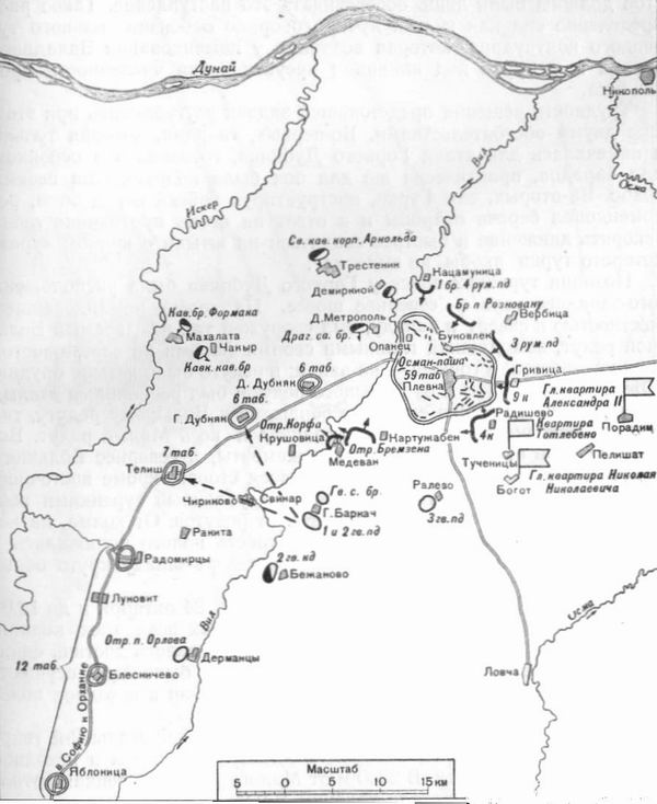 разположение на турските укрепления по пътя Плевен-София 1877г.